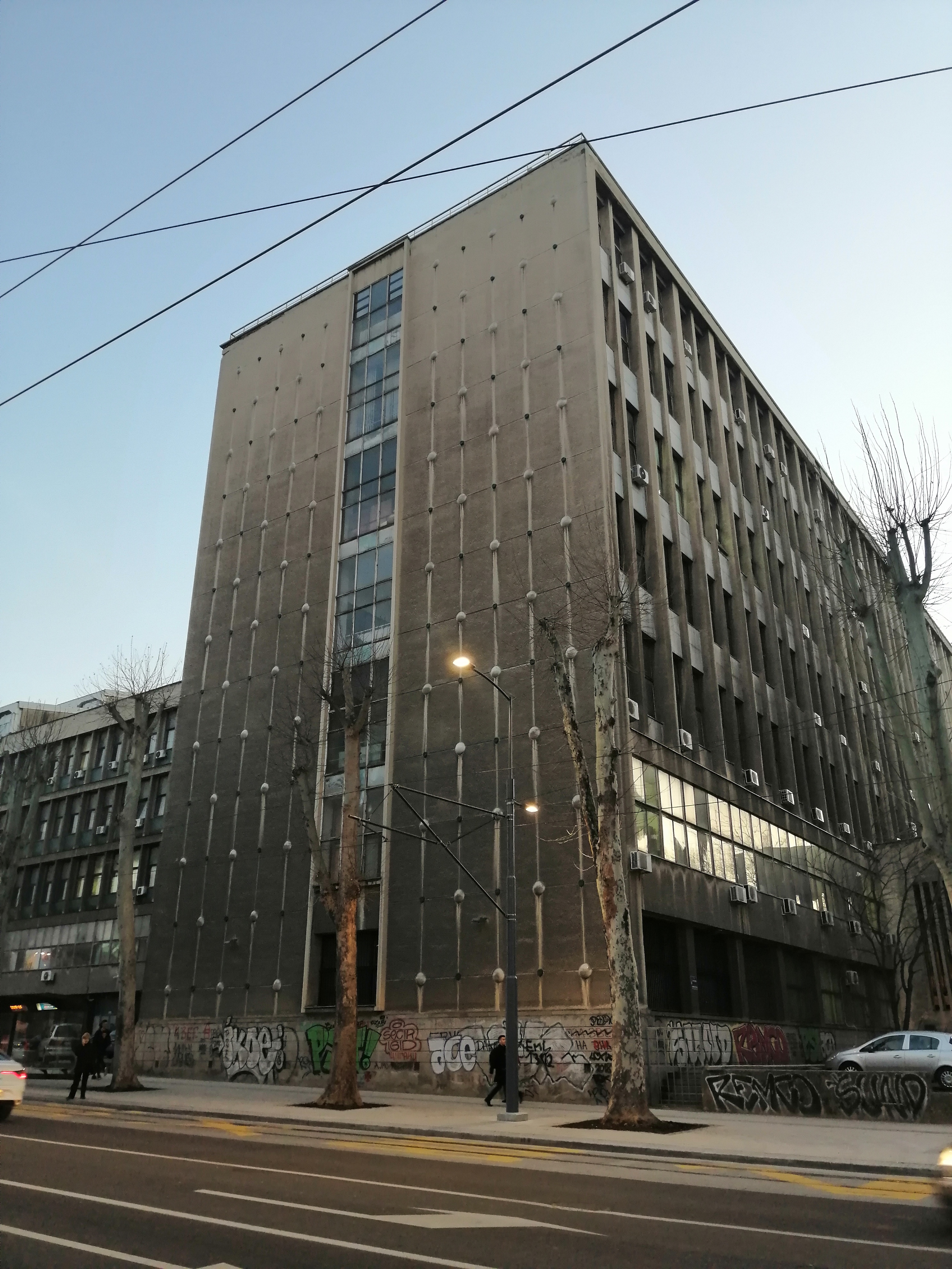 Srpski (latinica): Mašinski fakultet